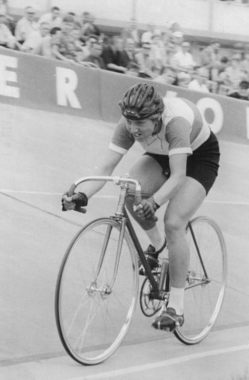 Andrea Elle Zentralbild Koch 20.7.1960 Sd-Do Leipzig:Deutsche Bahnmeisterschaften Die Deutschen Meisterschaften im Bahnsport werden am 20.-21.7.1960 auf der Alfred-Rosch-Kampfbahn in Leipzig ausgetragen. UBz:Deutsche Meisterin im 3000 m-Zeitfahren der Frauen wurde Andrea Elle (SC Einheit Berlin).